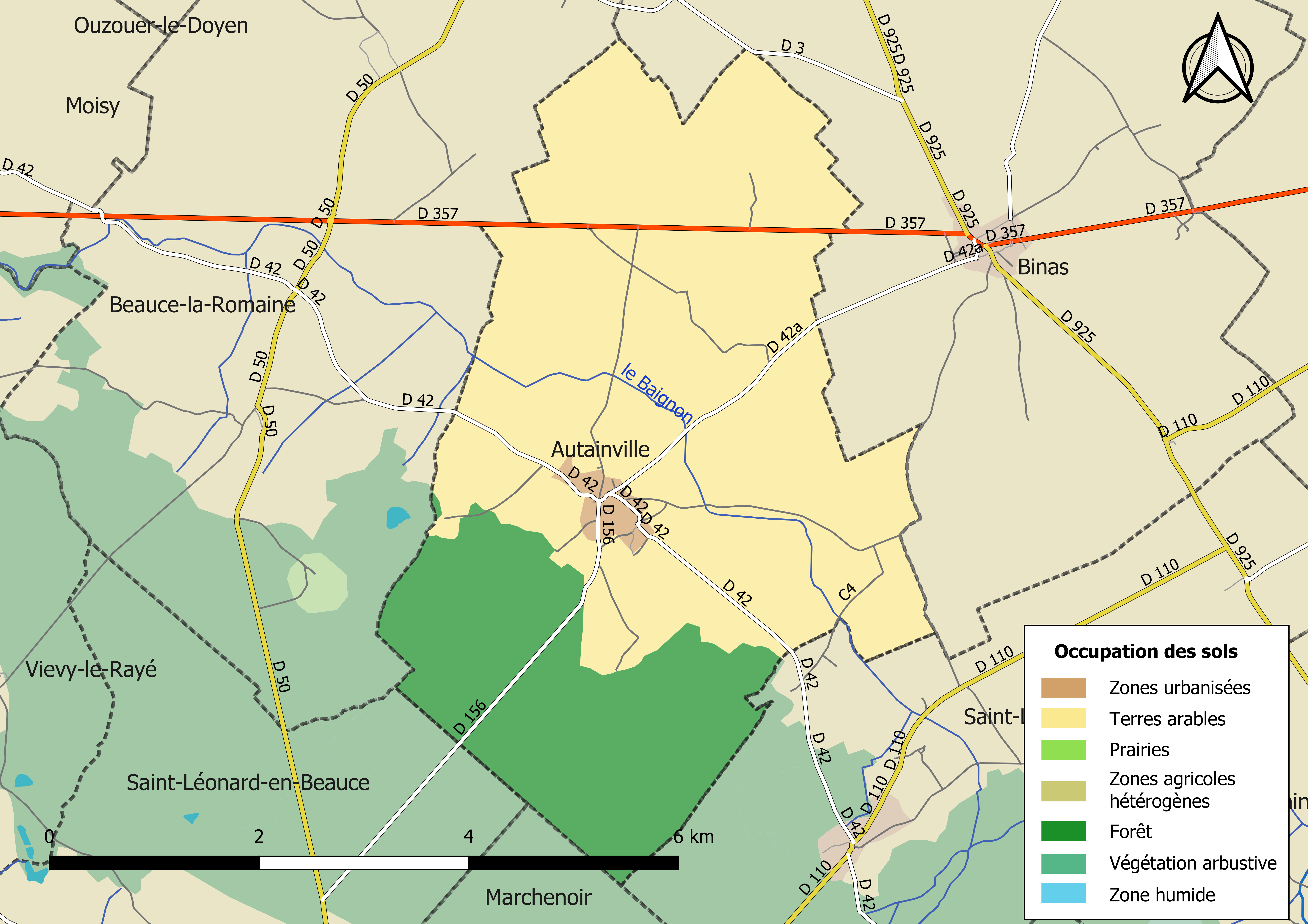 Carte des infrastructures et de l’occupation des sols en 2018 de la commune de Autainville (France).